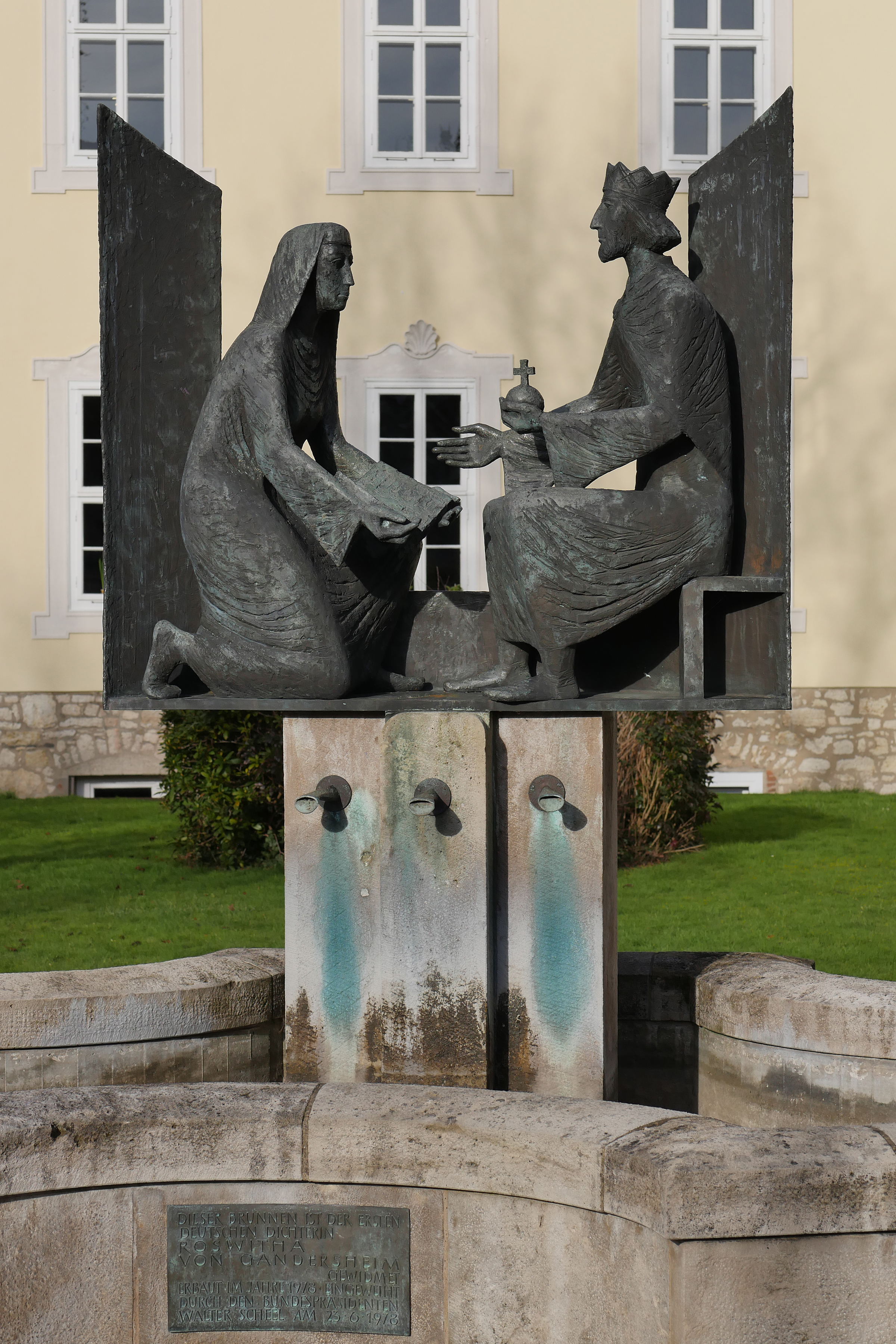 Dieses 1978 errichtete Denkmal zeigt links die erste deutsche Dichterin, Roswitha von Gandersheim.